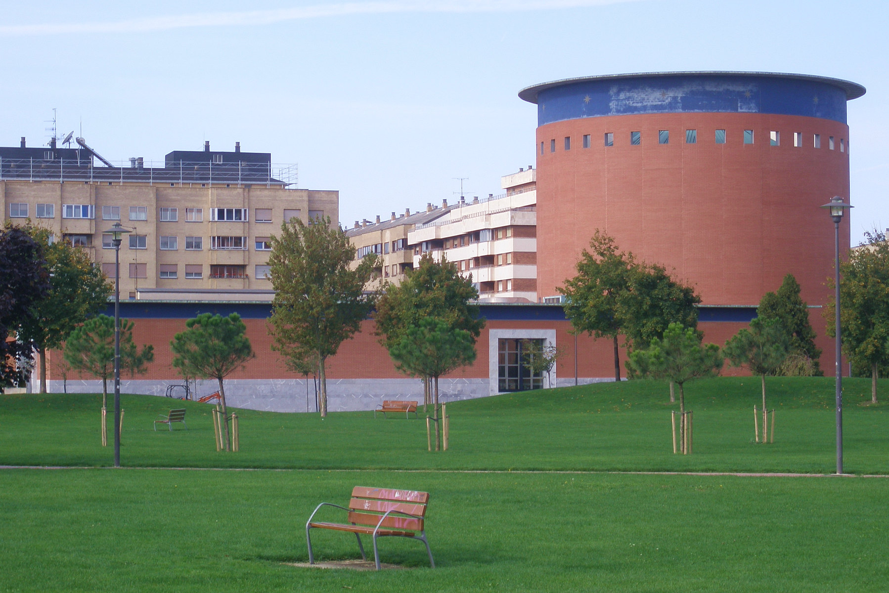 Planetario Pamplona